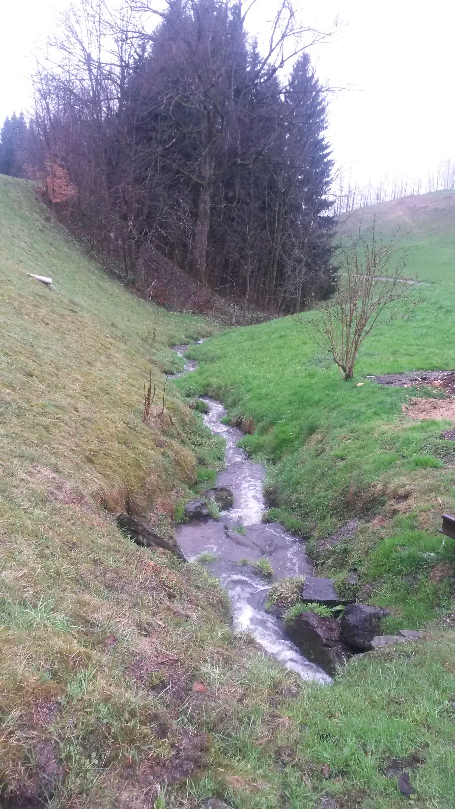 Bantlingergraben in Dornbirn, Vorarlberg, Österreich bei Gewässerkilometer 0,53.